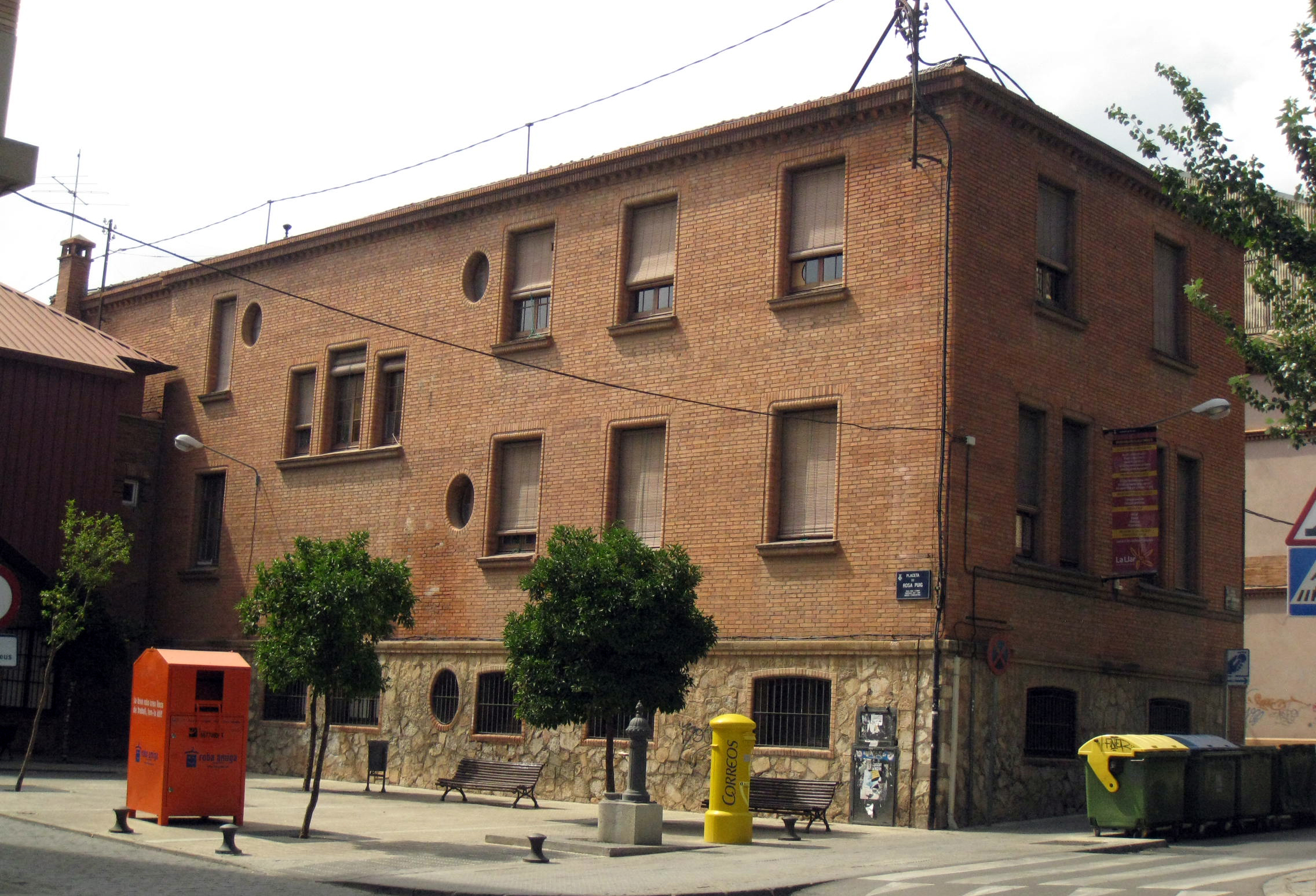 Escola Municipal de la Llar, o Escola d'Economia Domèstica, al carrer de Sant Isidre núm. 1-5 (Terrassa). Edifici modernista de Melcior Viñals (1929). Façana posterior de l'edifici, que juntament amb l'ala afegida forma la placeta de Rosa Puig.